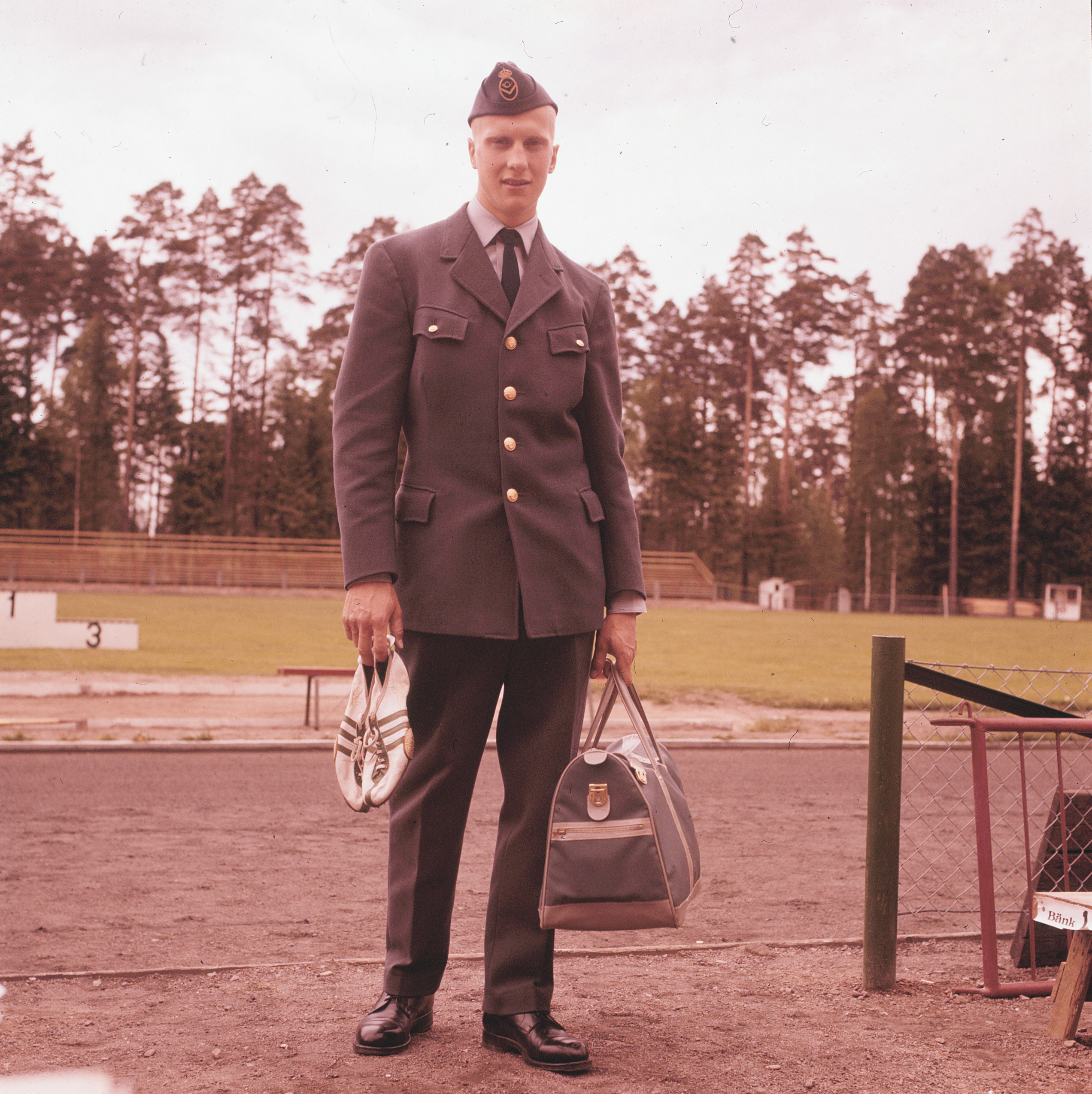 Postverkets vinteruniform m/1961